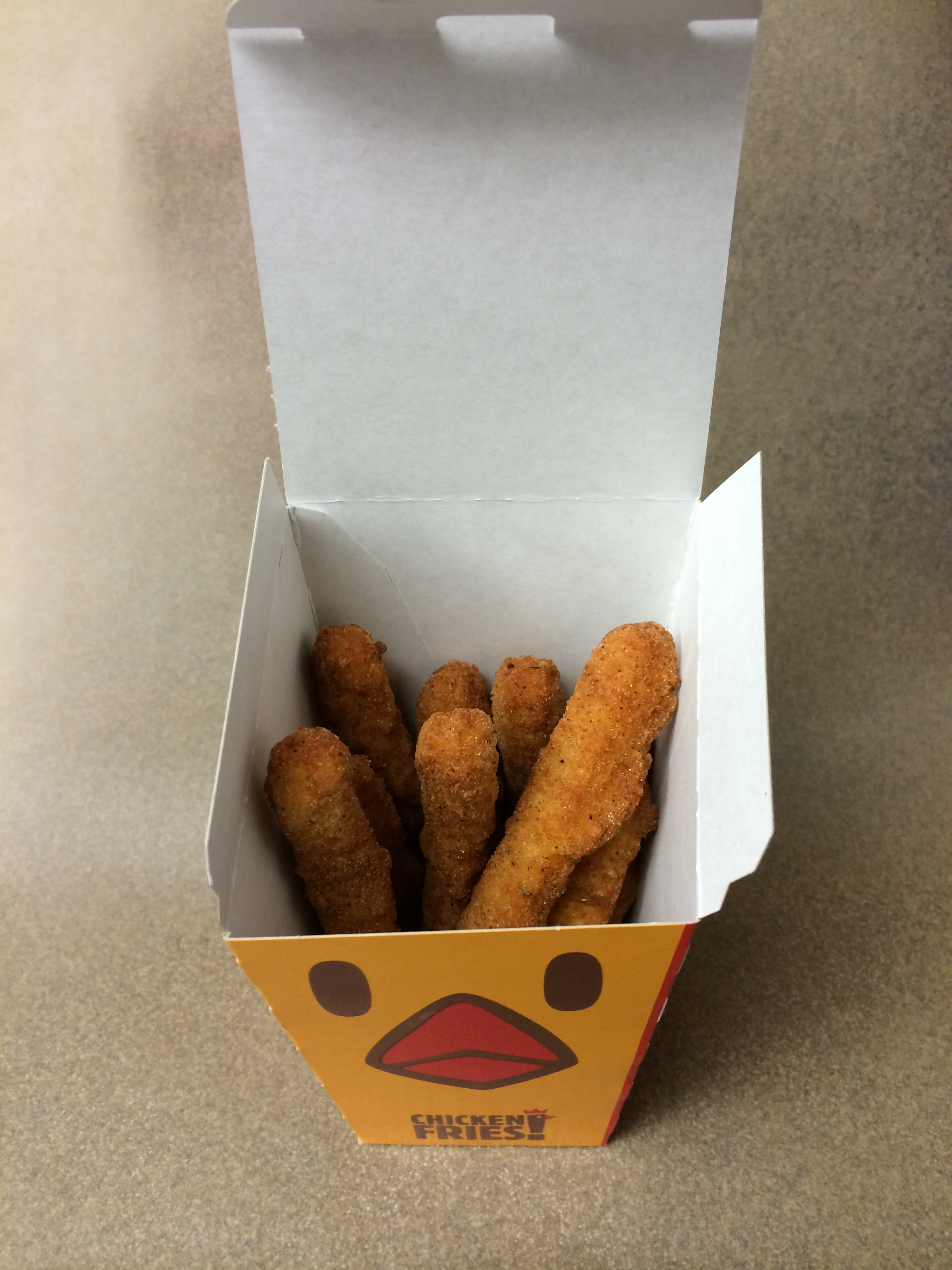 An order of Burger King chicken fries.